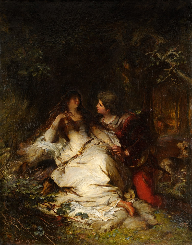 Paar im Wald. Illustration zu einer Sage? (angeboten als Tristan und Isolde). Signiert. Datiert 1875. Öl/Lwd., 130 x 103 cm.